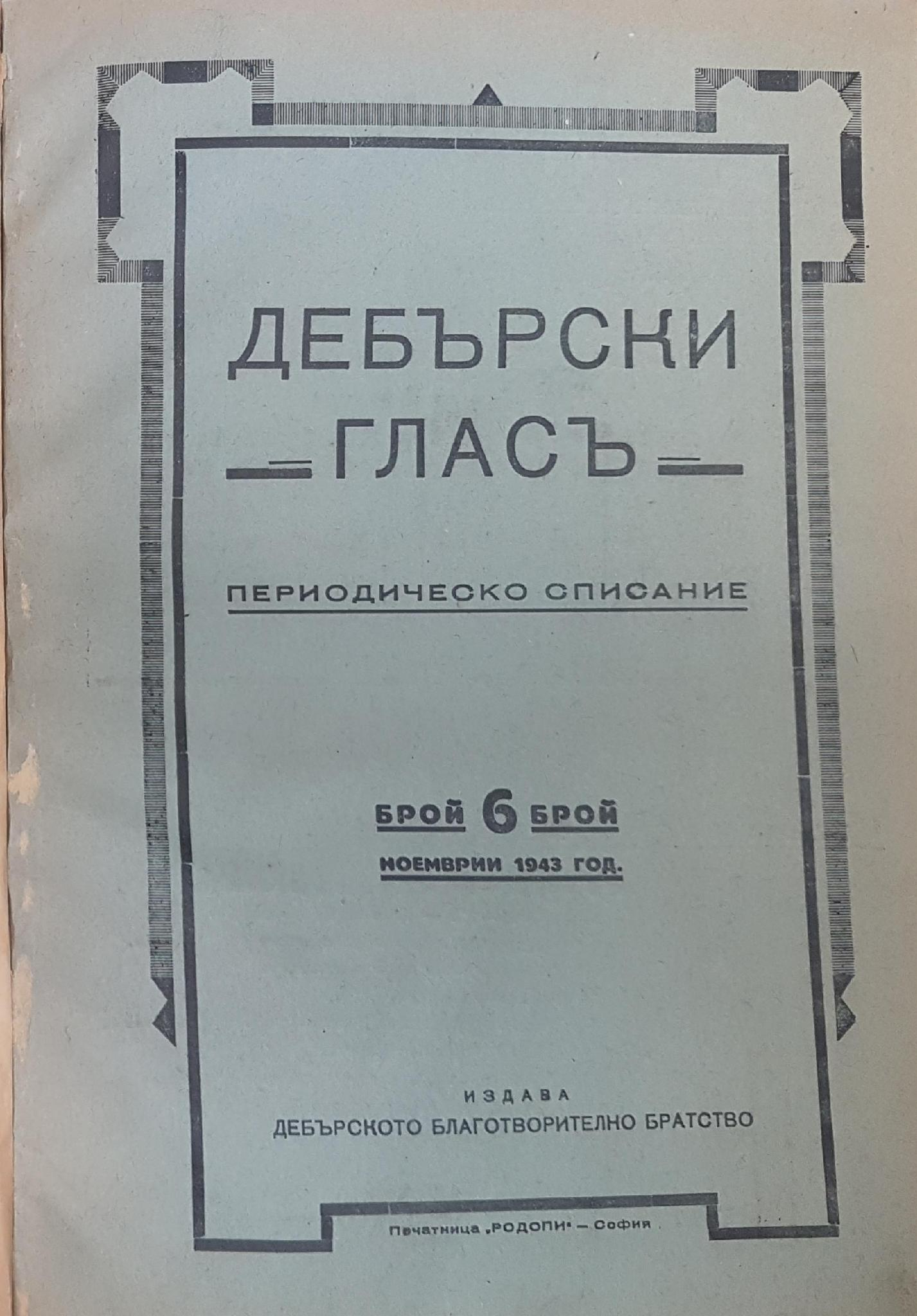 Дебърски глас